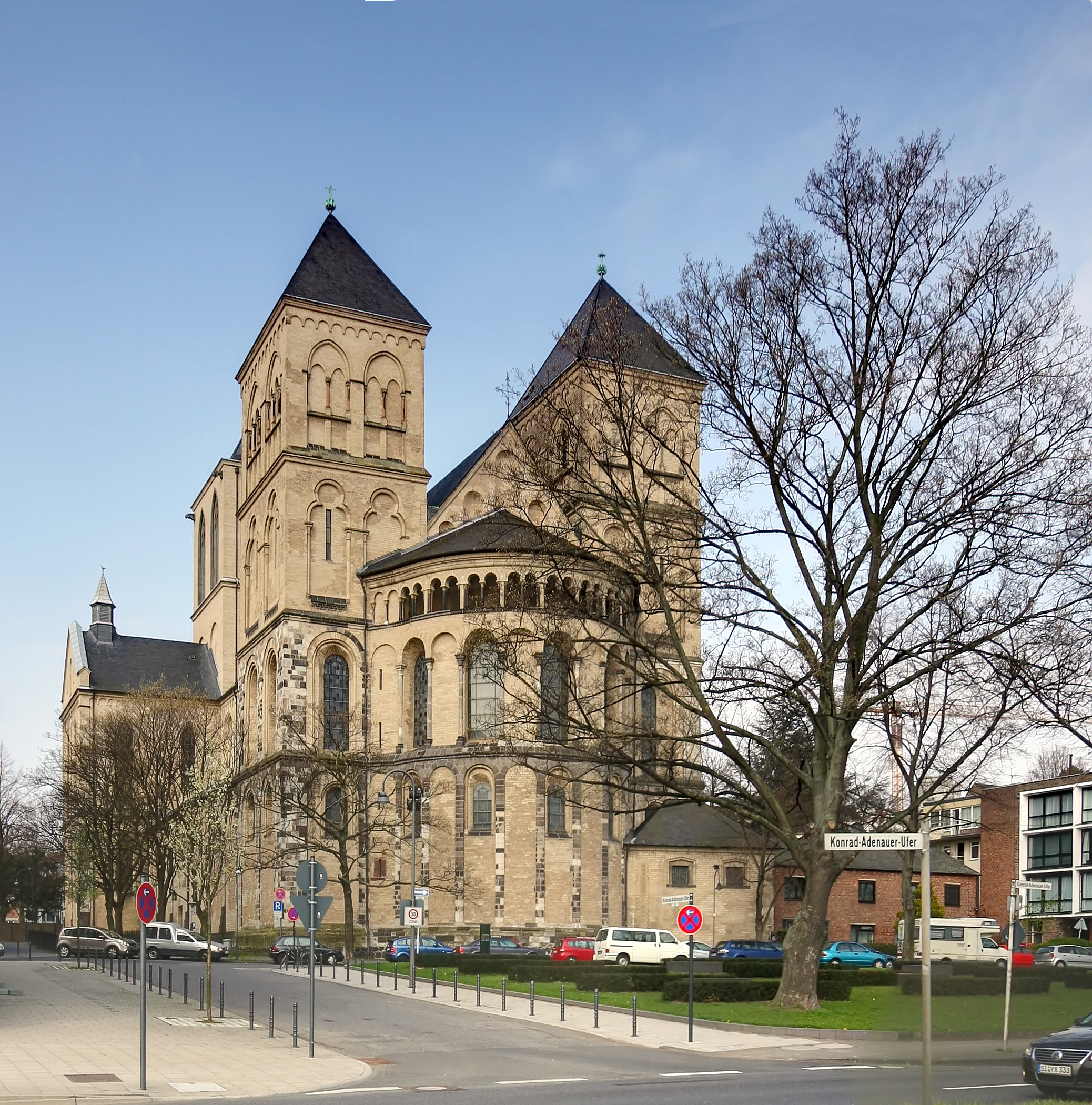 Chor und Türme von St. Kunibert, Köln. This is a photograph of an architectural monument.